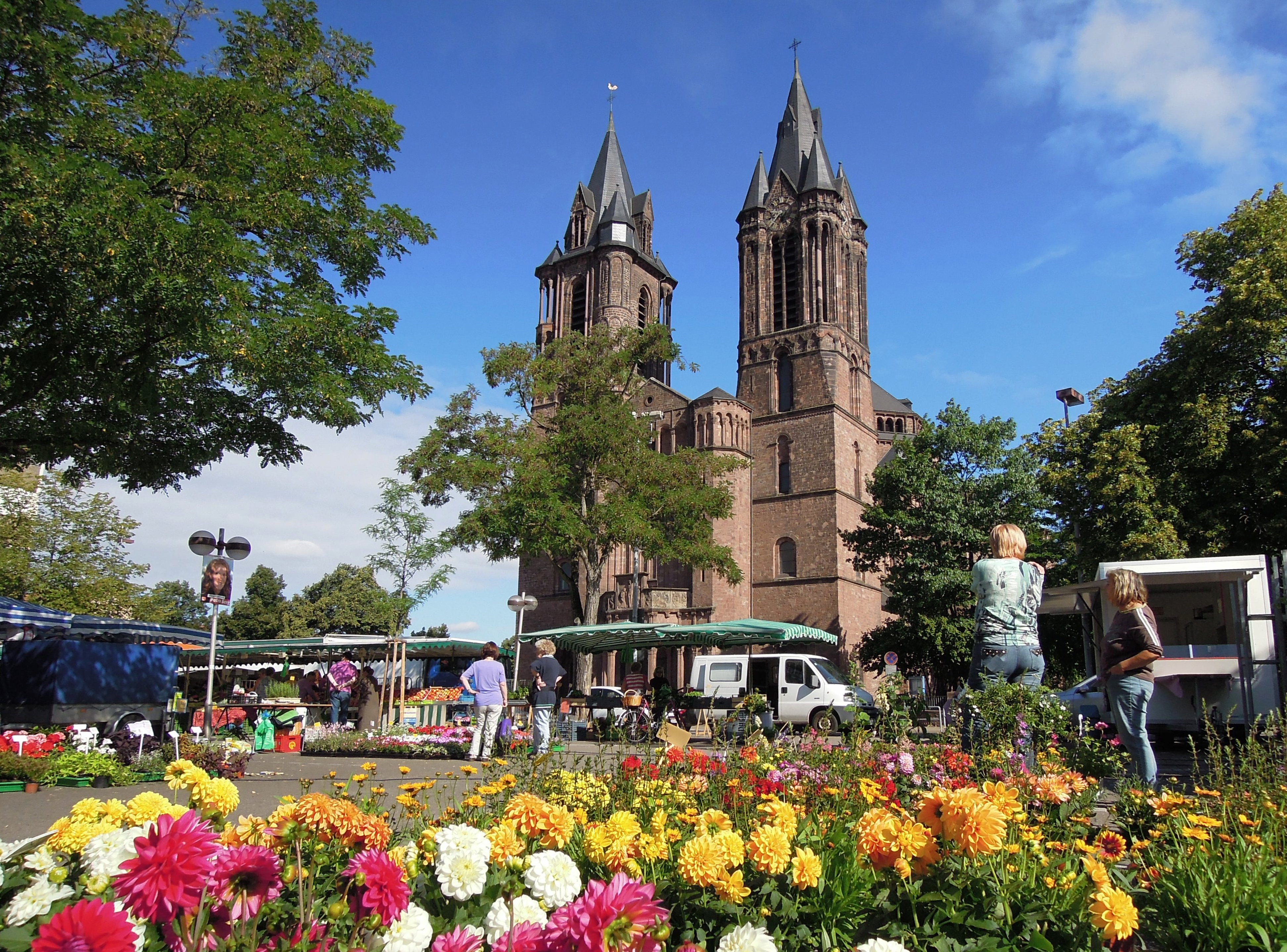 Saardom am Markttag